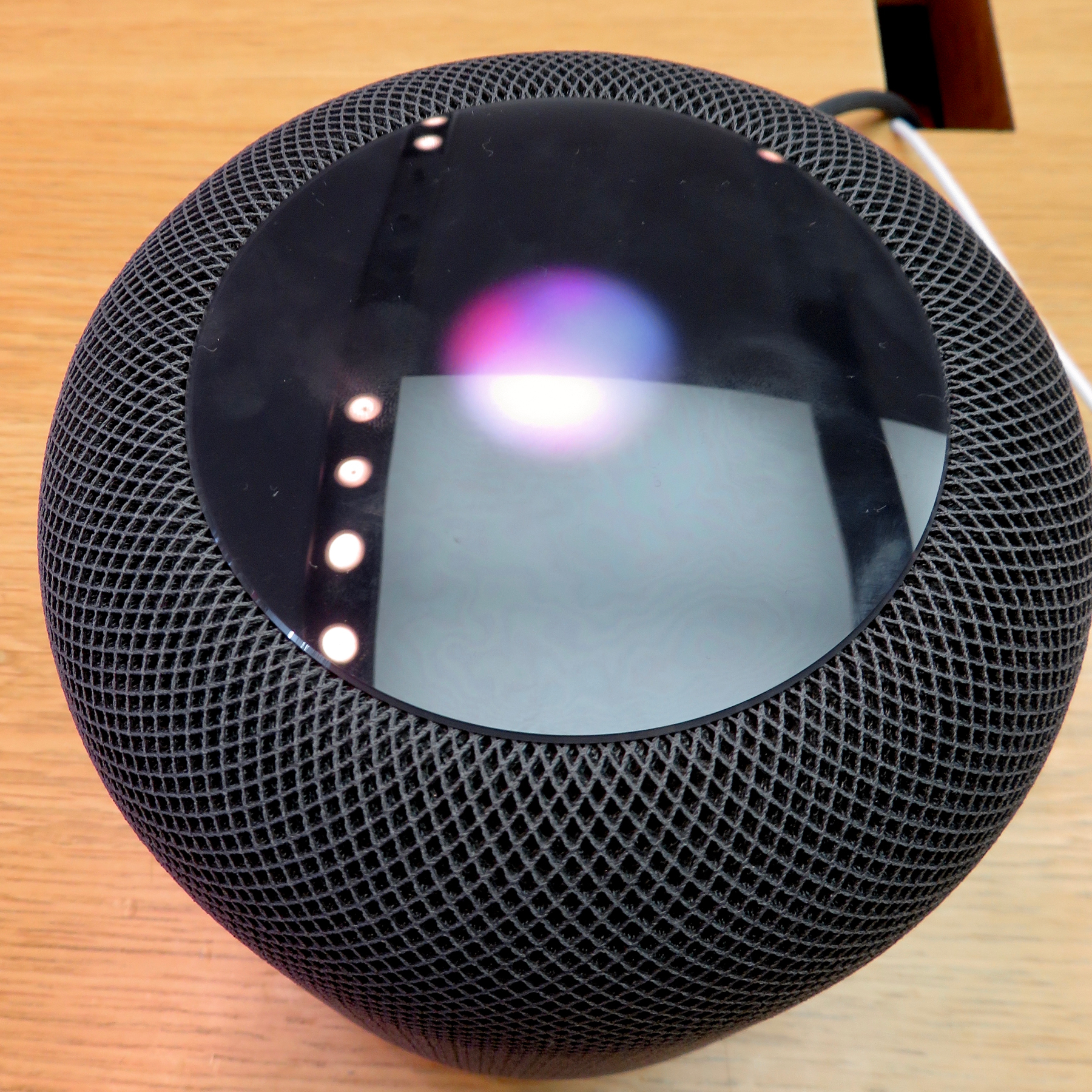 Siriが利用可能な状態のHomePod。